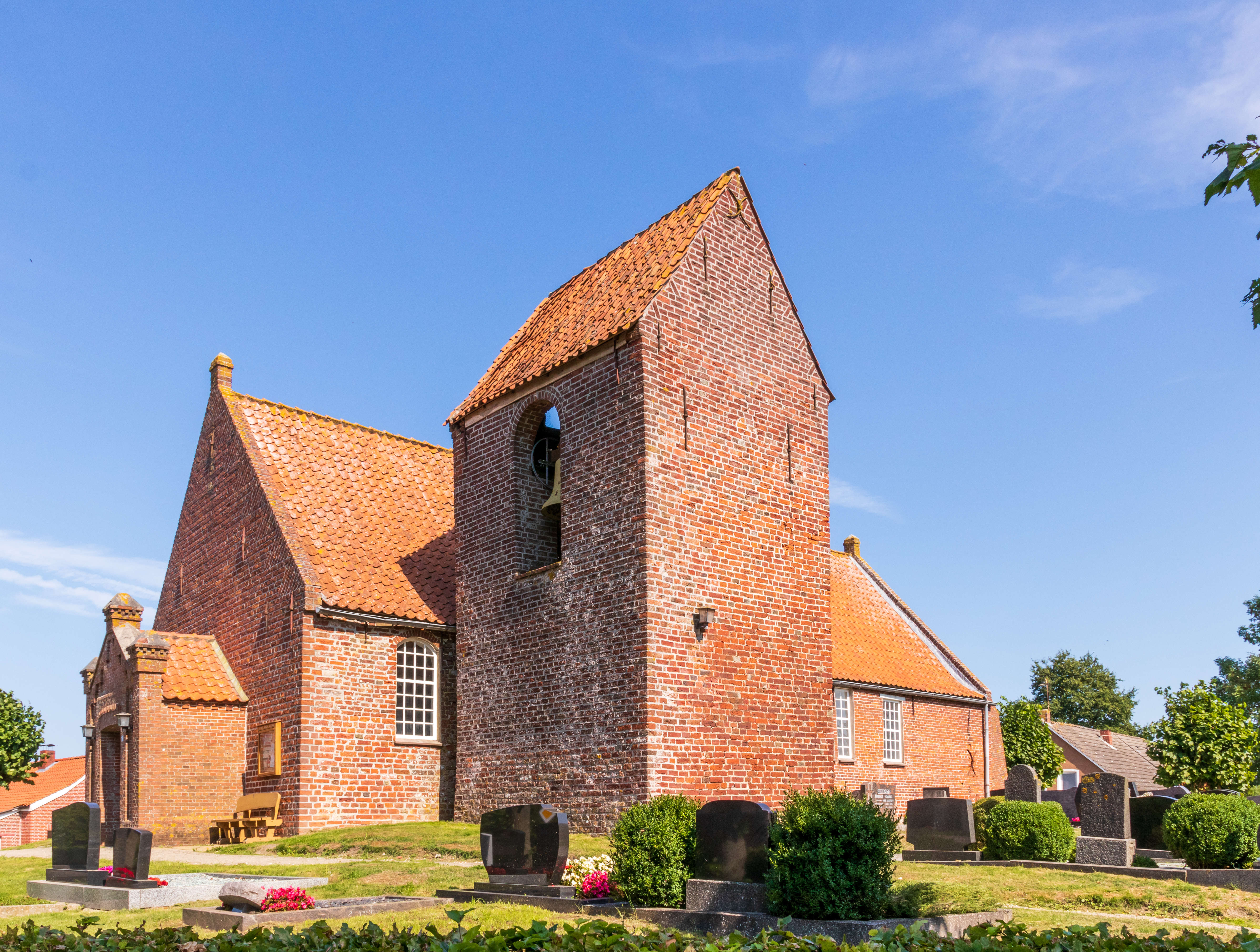 Ev. Rev. Kirche Critzum. Niedriger, einschiffiger Ziegelbau mit alter Fenster- und Portalform an der Südseite. Im Kern romanischer Backsteinbau des 13. Jahrhunderts. Bedeutung: historisch, künstlerisch, wissenschaftlich, städtebaulich; wesentliche Begründung: 1.05 geschichtliche Bedeutung aufgrund des Zeugnis- und Schauwertes für Bau- und Kunstgeschichte; Einzeldenkmal gemäß § 3.2 NDSchG; in Gruppe baulicher Anlagen: 457012Gr0012